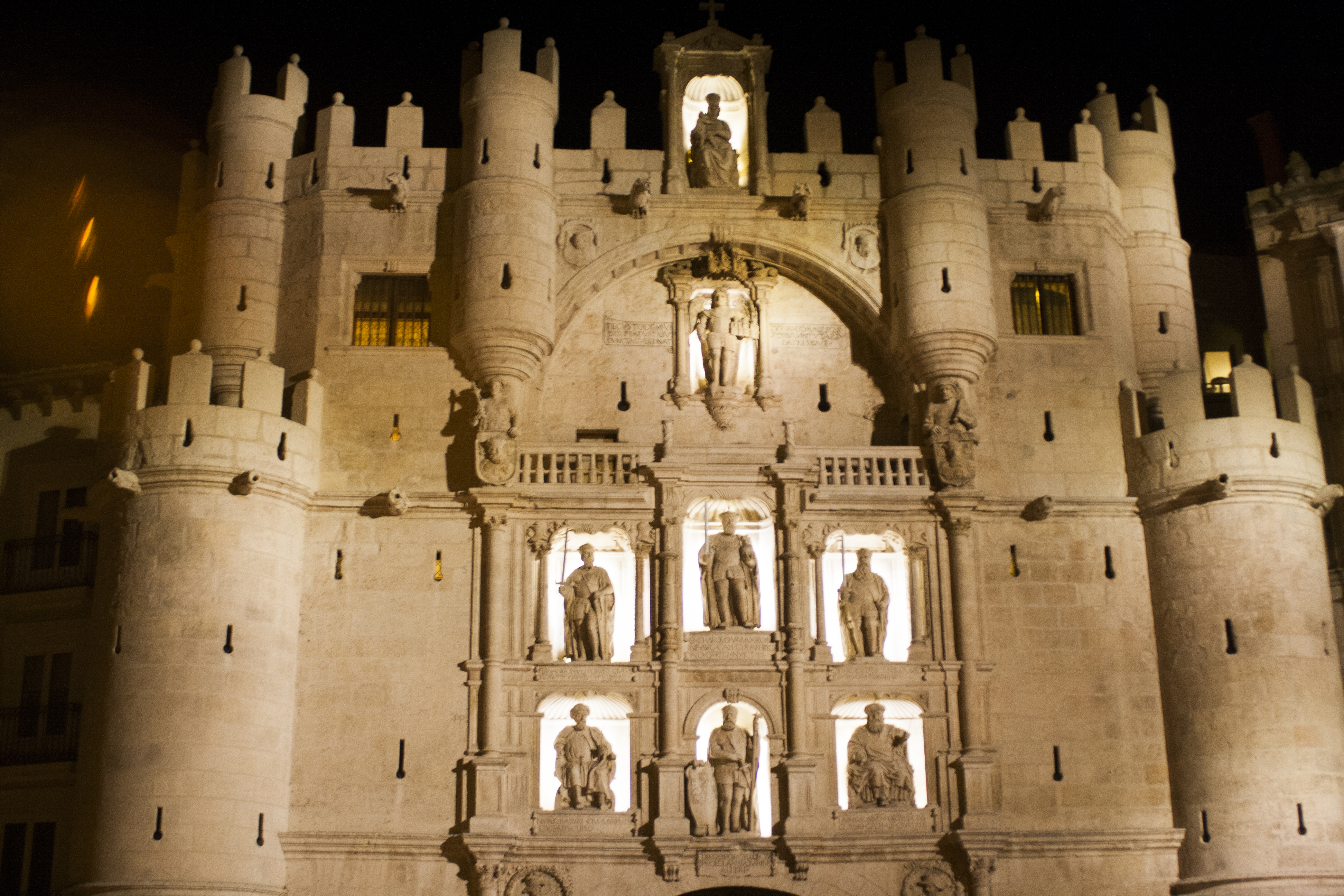 El Arco de Santa María fue la puerta de entrada más importante a la ciudad medieval de Burgos, y conecta el puente de Santa María, que pasa sobre le río Arlanzón, y la plaza del Rey San Fernando, donde está ubicada la catedral.